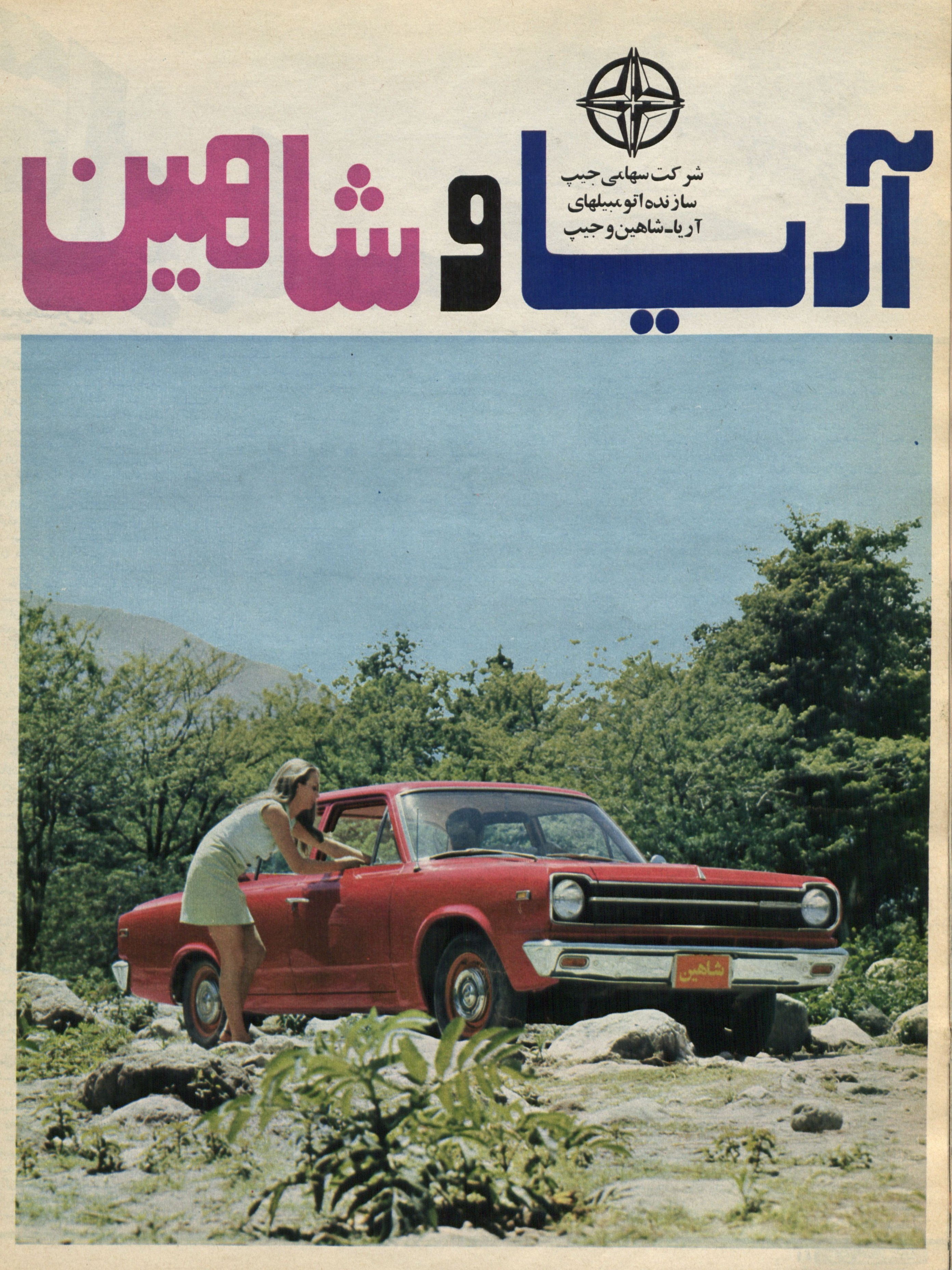 تبلیغ آریا و شاهین در مجلهٔ اطلاعات هفتگی